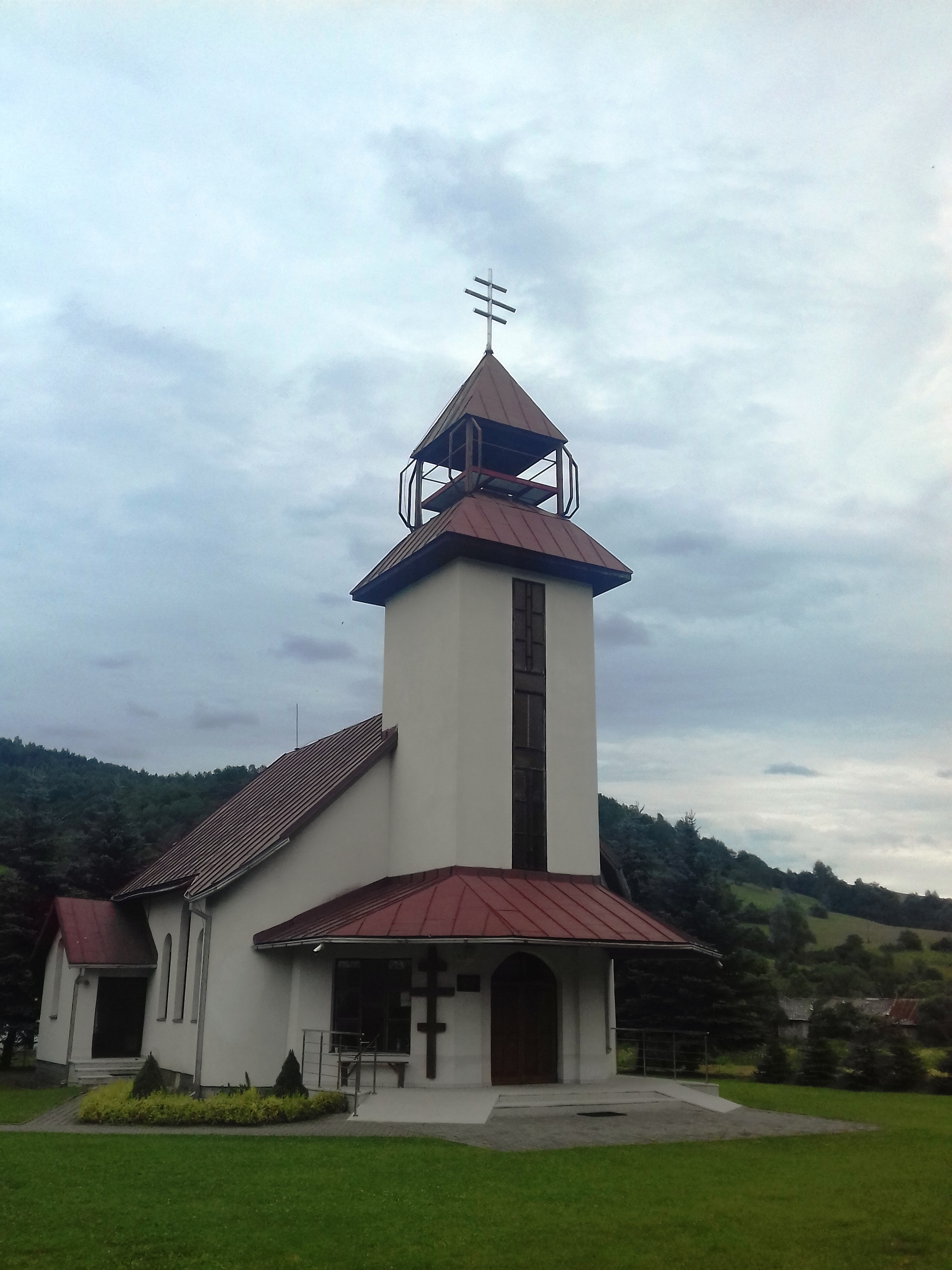 Topol'a (Słowacja) - cerkiew greckokatolicka Św. Piotra i Pawła